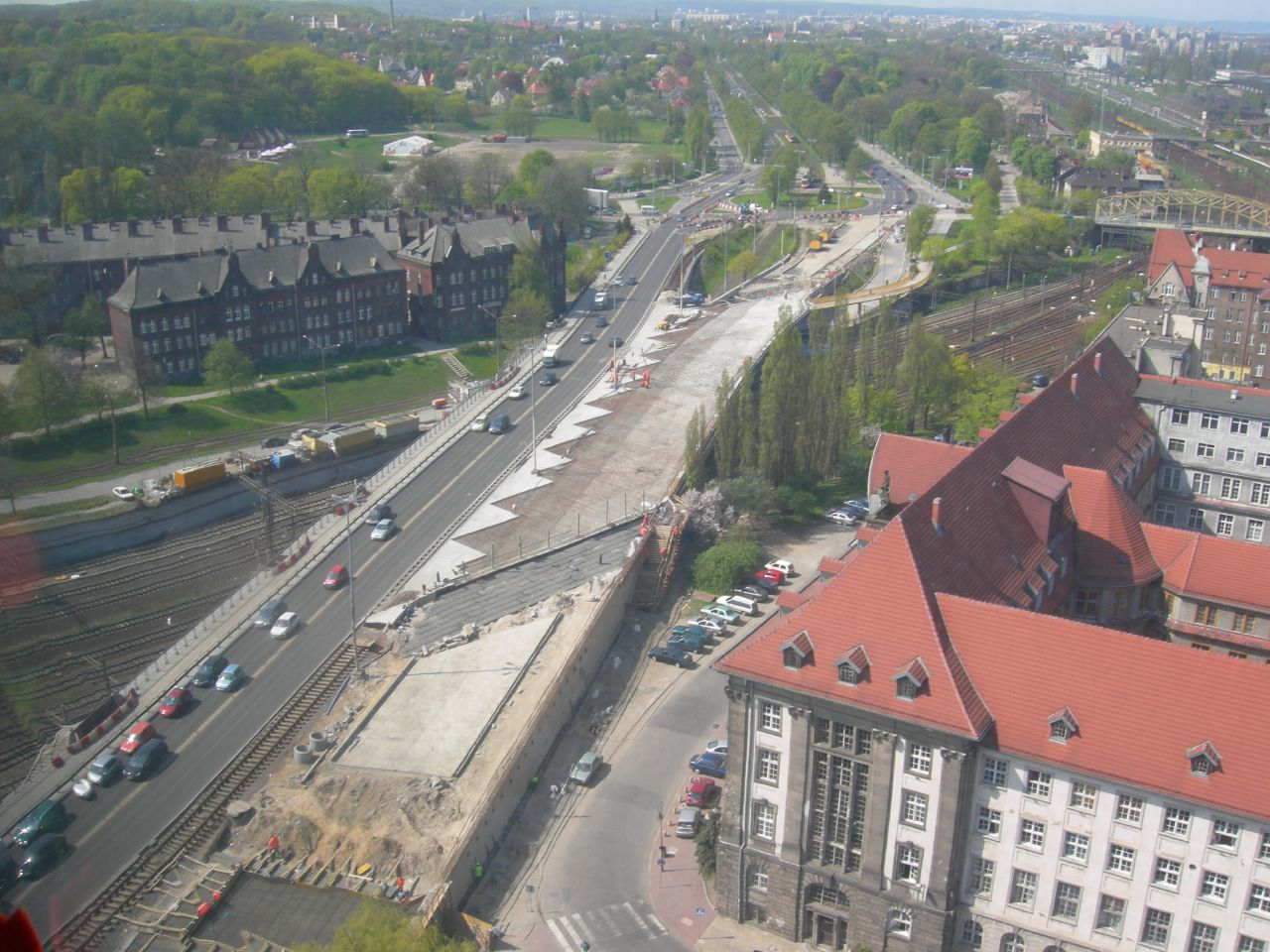 Wiadukt Błędnik w Gdańsku, w trakcie remontu w 2006 r.